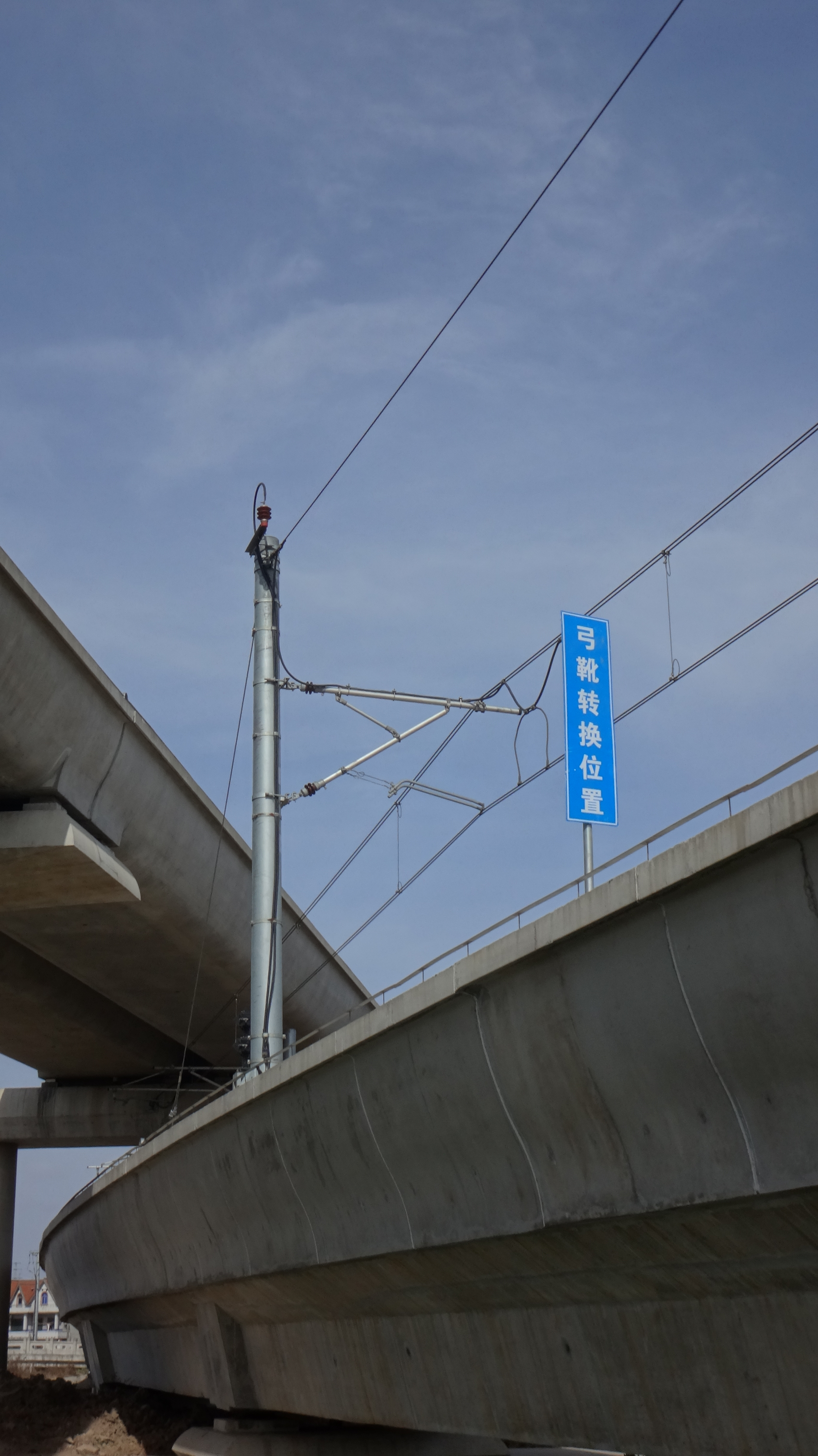 上海轨道交通16号线治北车辆段与16号线正线联络线上的弓靴转换位置。